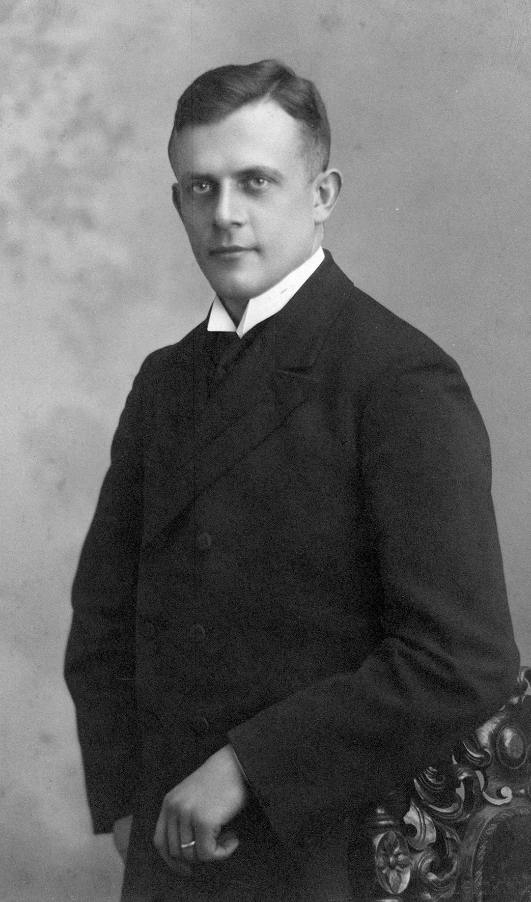 Schneider. Paul, Pfarrer, Als Hilfsprediger in Essen 1925, Rückseite: "Paul Schneider +1939".Abgabe: FFFZ 9/2000, aus Bestand: AEKR Düsseldorf 8SL046 (Bildarchiv), 80002_01